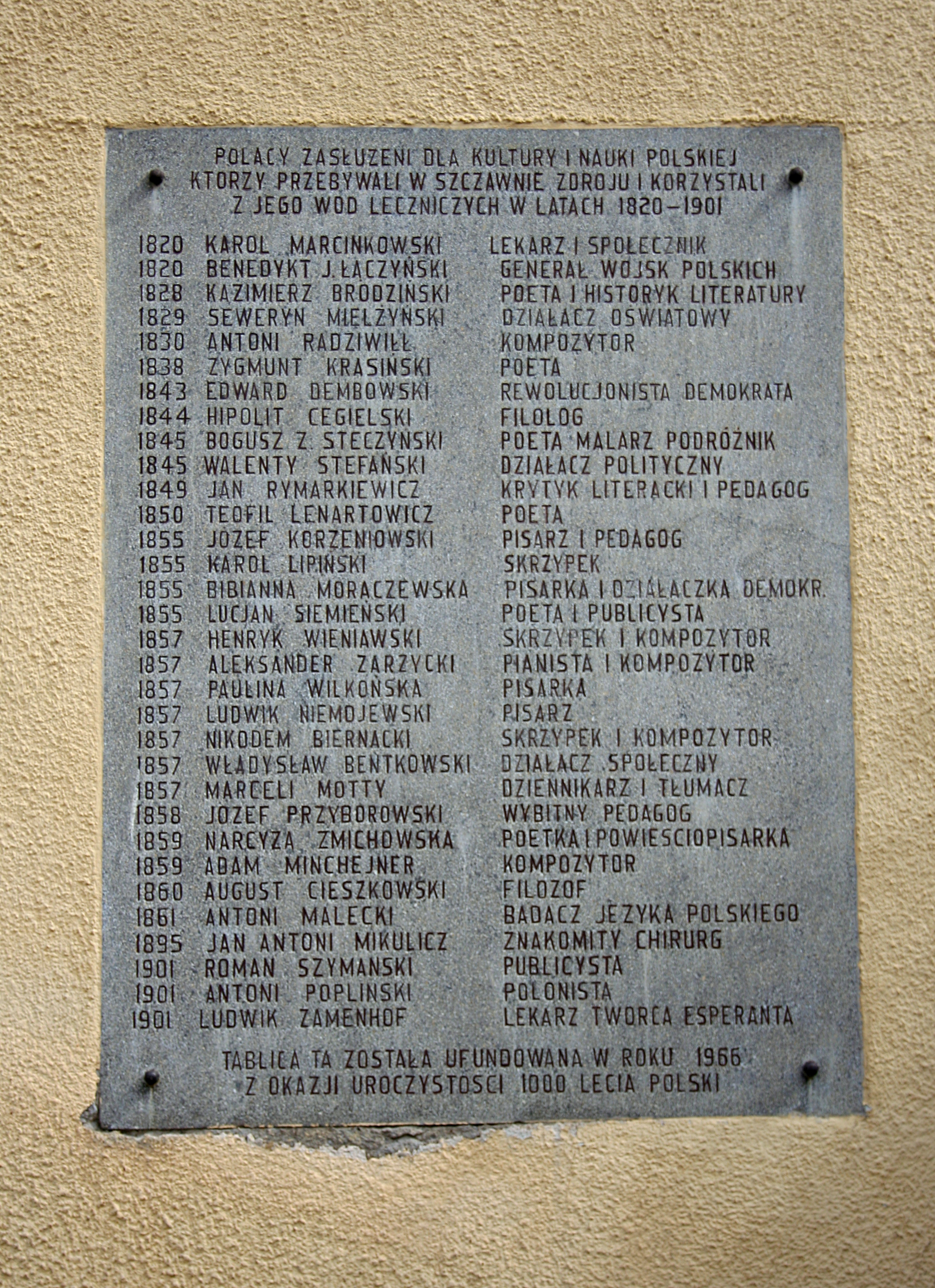 Zakład Przyrodoleczniczy w Szczawnie-Zdroju: Tablica ze znanymi Polakami, którzy bywali Obersalzbrunn do pocżatku XX wieku